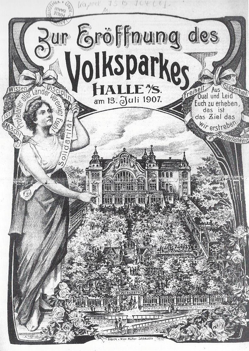 „Freiheitsgöttin und sozialistische Losungen auf dem Titelbild der Festschrift, die zum Einweihungstag am 13. Juli 1907 ausgegeben wurde. Neben politischem Pathos und Bildungsappell illustriert die Garten-Szenerie, dass der Volkspark auch ein Ort der Geselligkeit für die ganze Familie werden sollte.“ (Tobias Kügler)